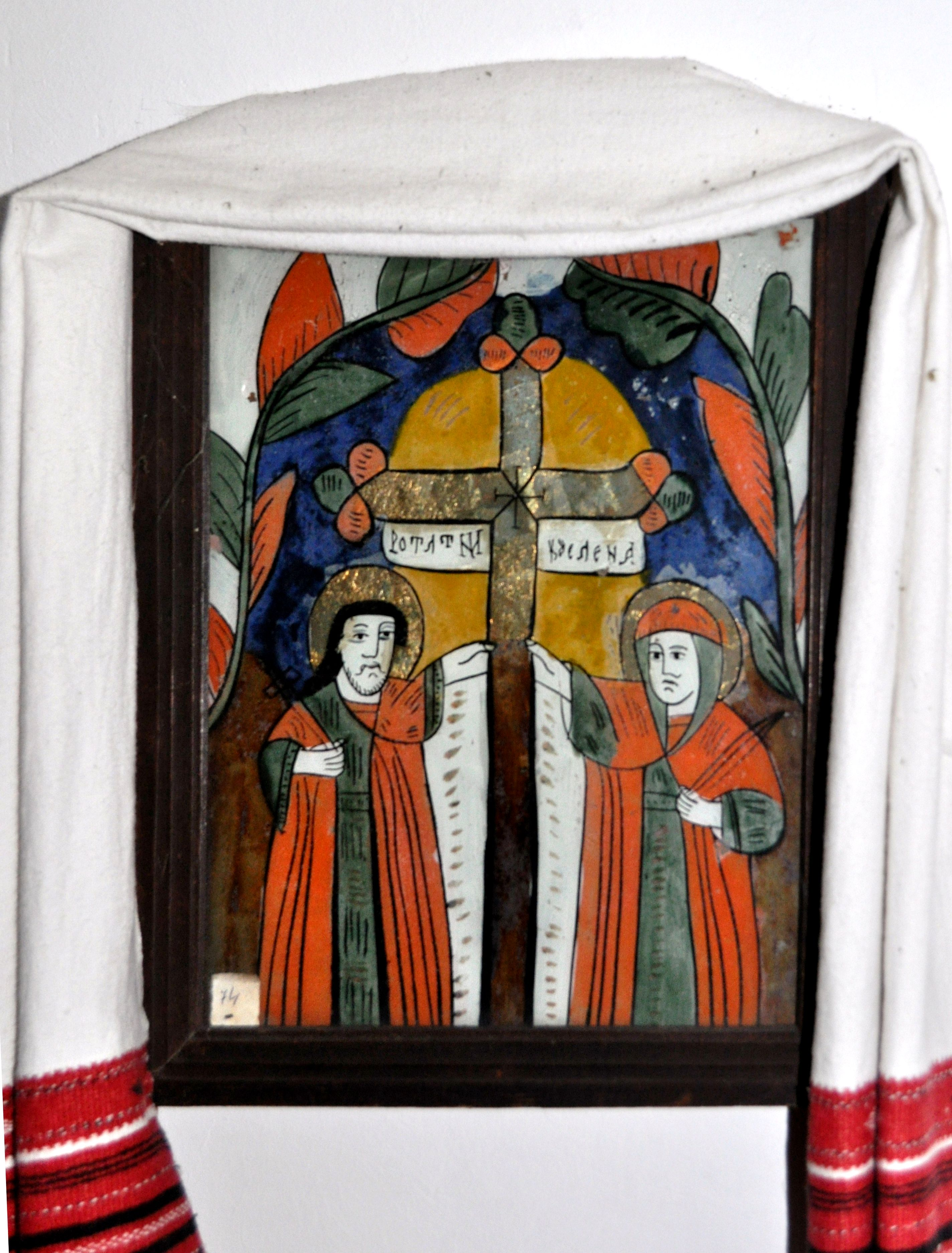 Biserica de lemn „Înălțarea Sfintei Cruci” din Bălcești, județul Cluj